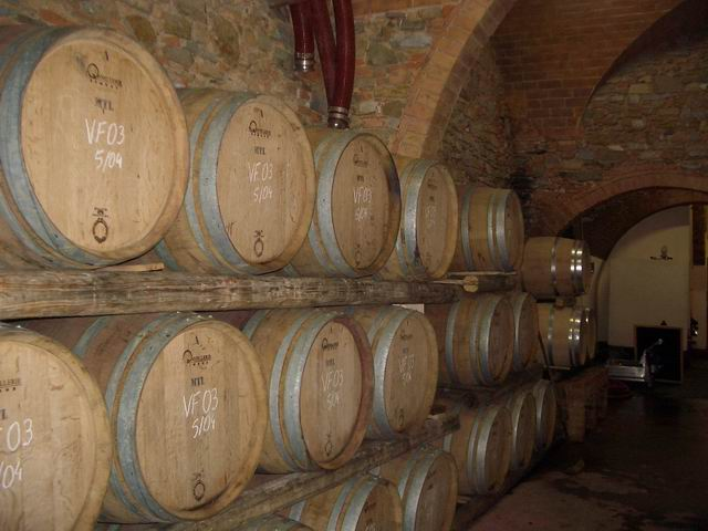 Barriques in Filicaja's wine cellar